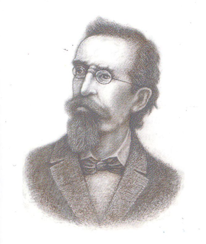 Lithografie von Johann Georg Obrist (1843-1901)